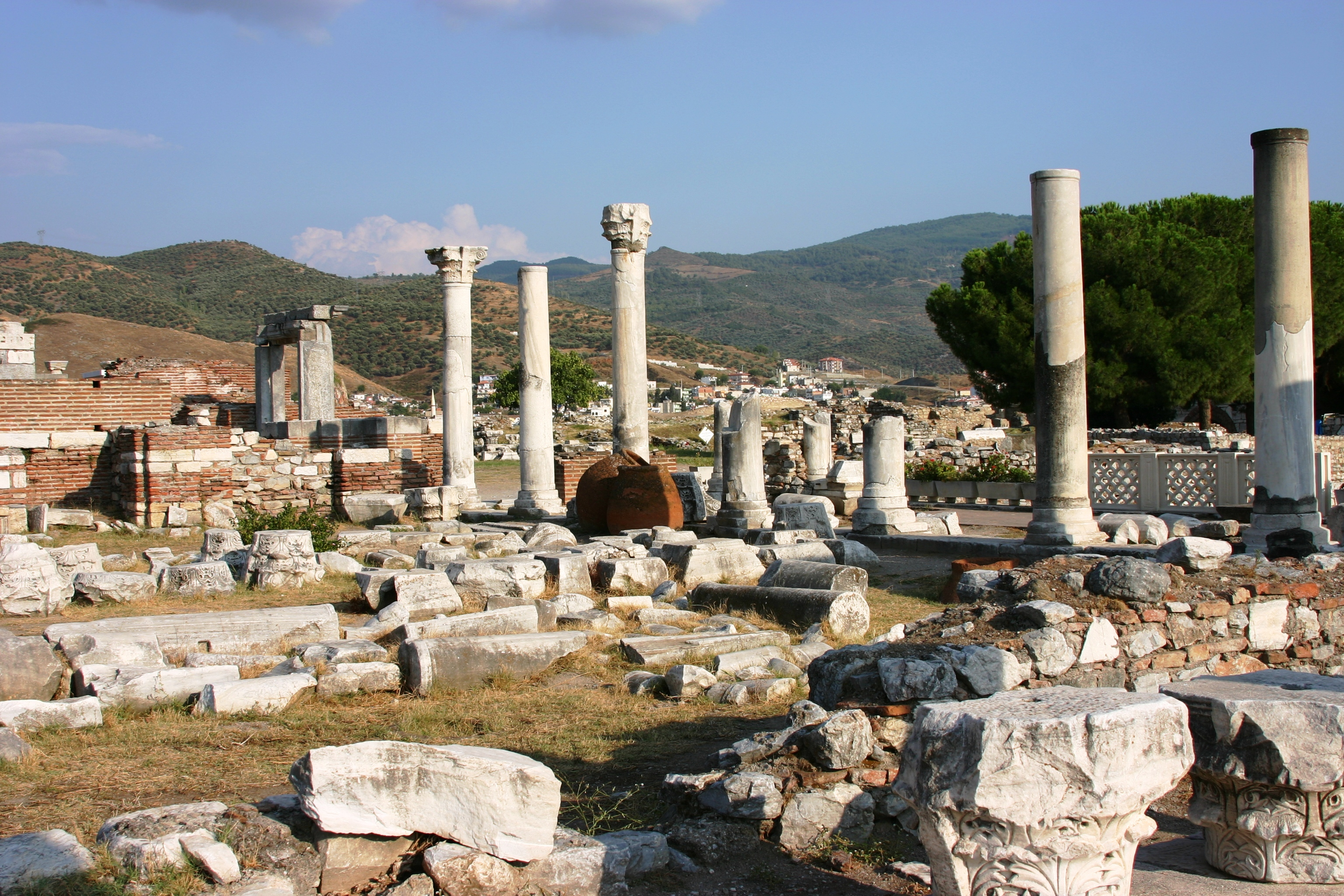 Igreja de São João, em Éfeso